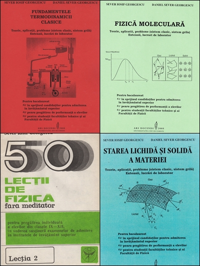 Colaj cu câteva dintre manualele publicate de fizicianul român S.I. Georgescu